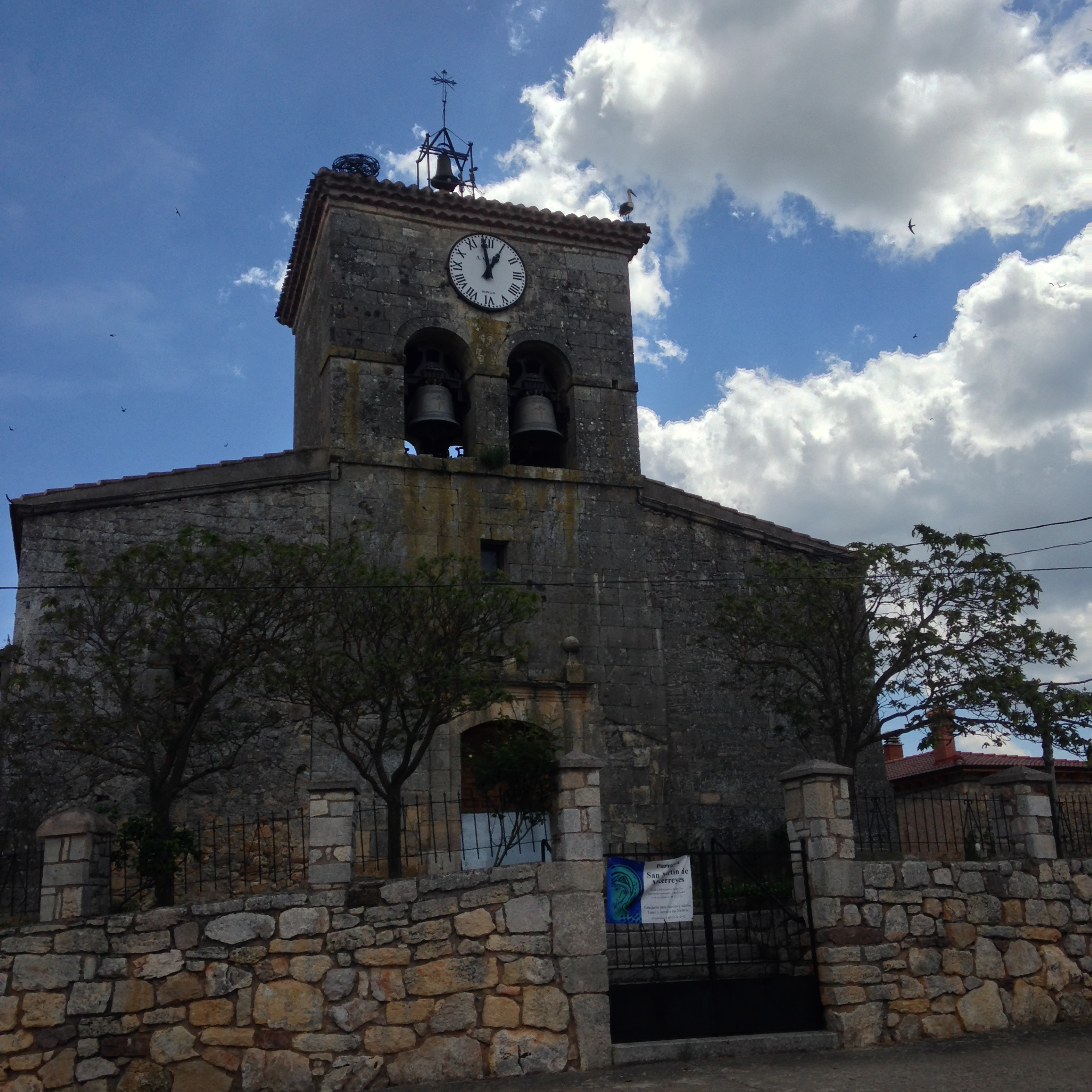 Cuevas de San Clemente